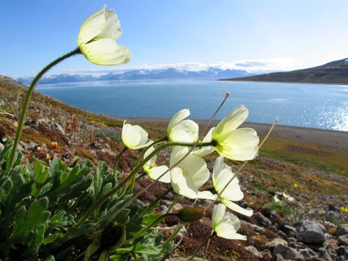 Svalbard Poppy (Papaver dahlianum), Svalbard, July 2004, by Michael Haferkamp